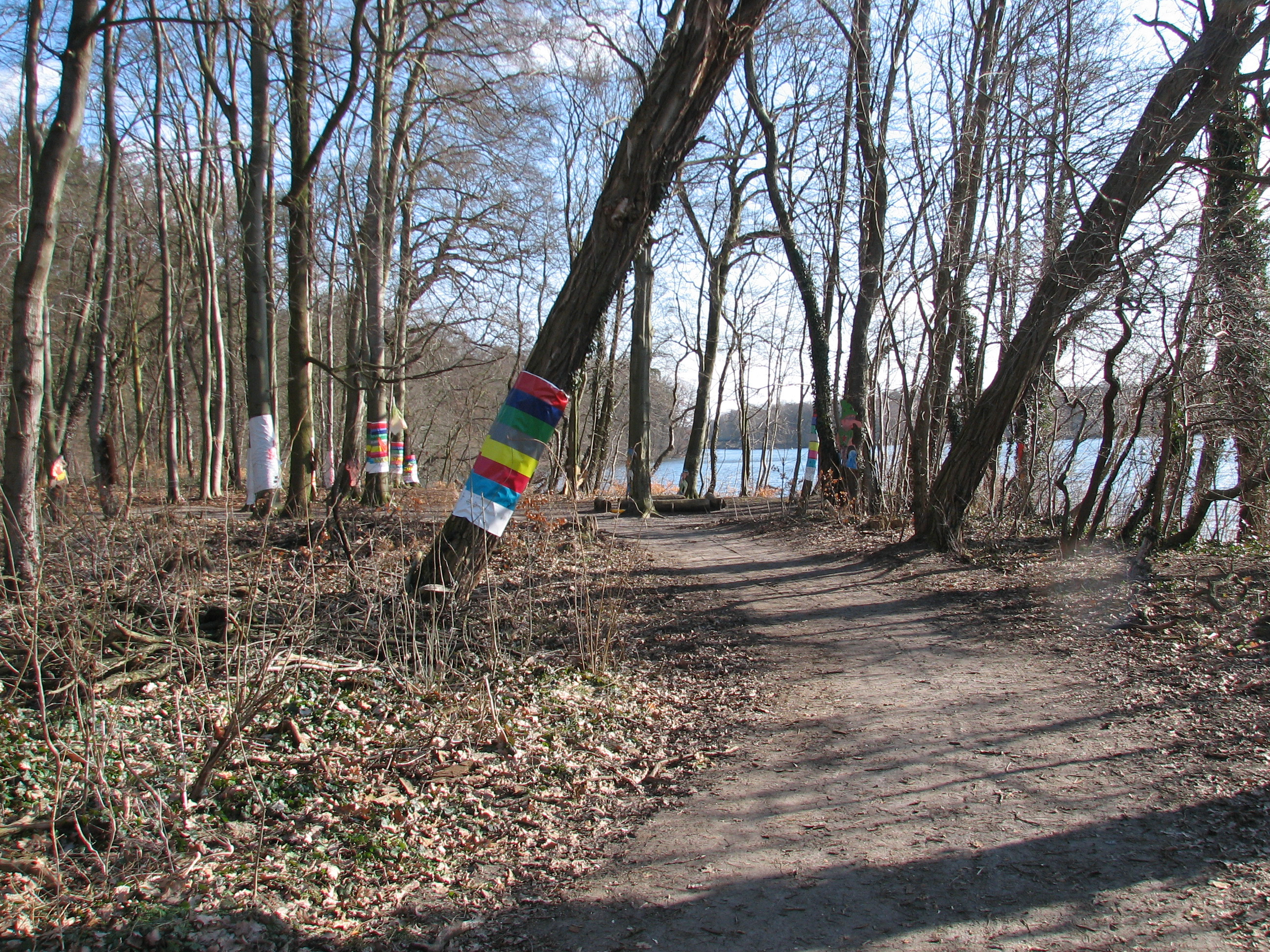 Machnower See: Protest gegen Abholzung. Der durch den geplanten Schleusenausbau gefährdete Bereich wurde durch farbige Bänder markiert.